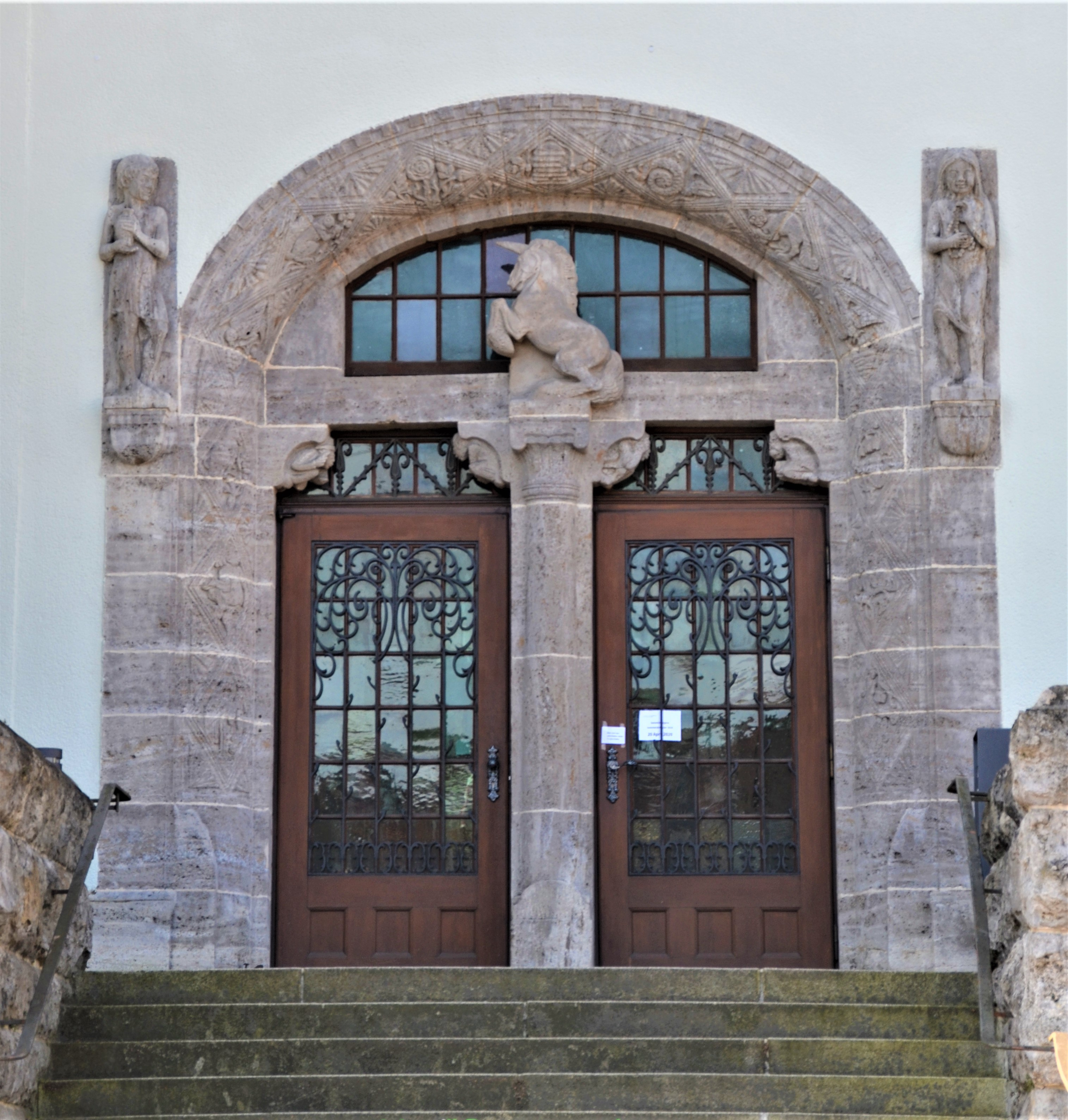 Haupteingang zur HfG Schwäbisch Gmünd an der Ostfassade des Elsaesserbaus